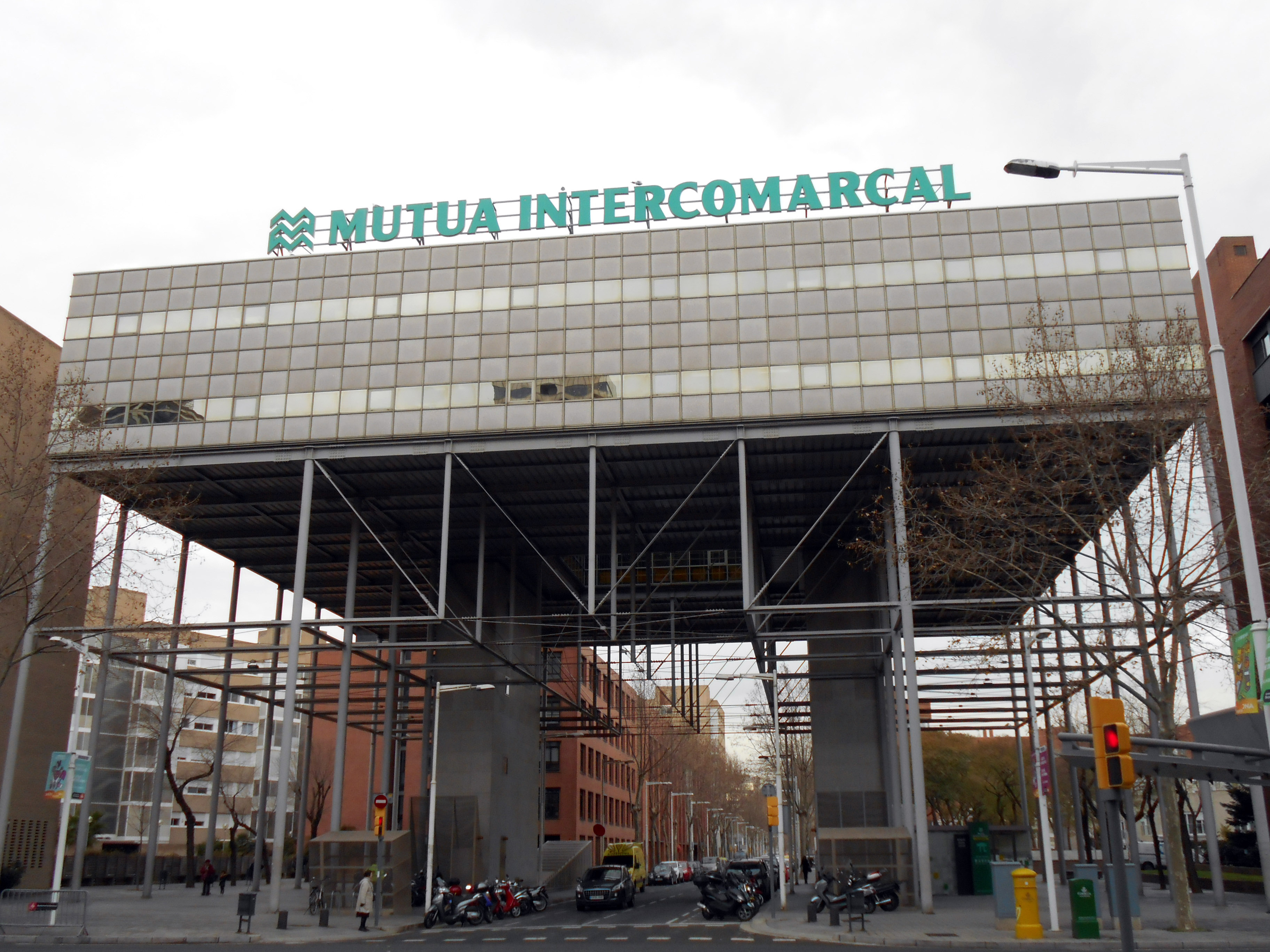 Edificio de oficinas Eurocity 1 (1989-1992), de Lluís Domènech i Girbau y Roser Amadó, Villa Olímpica, Barcelona.